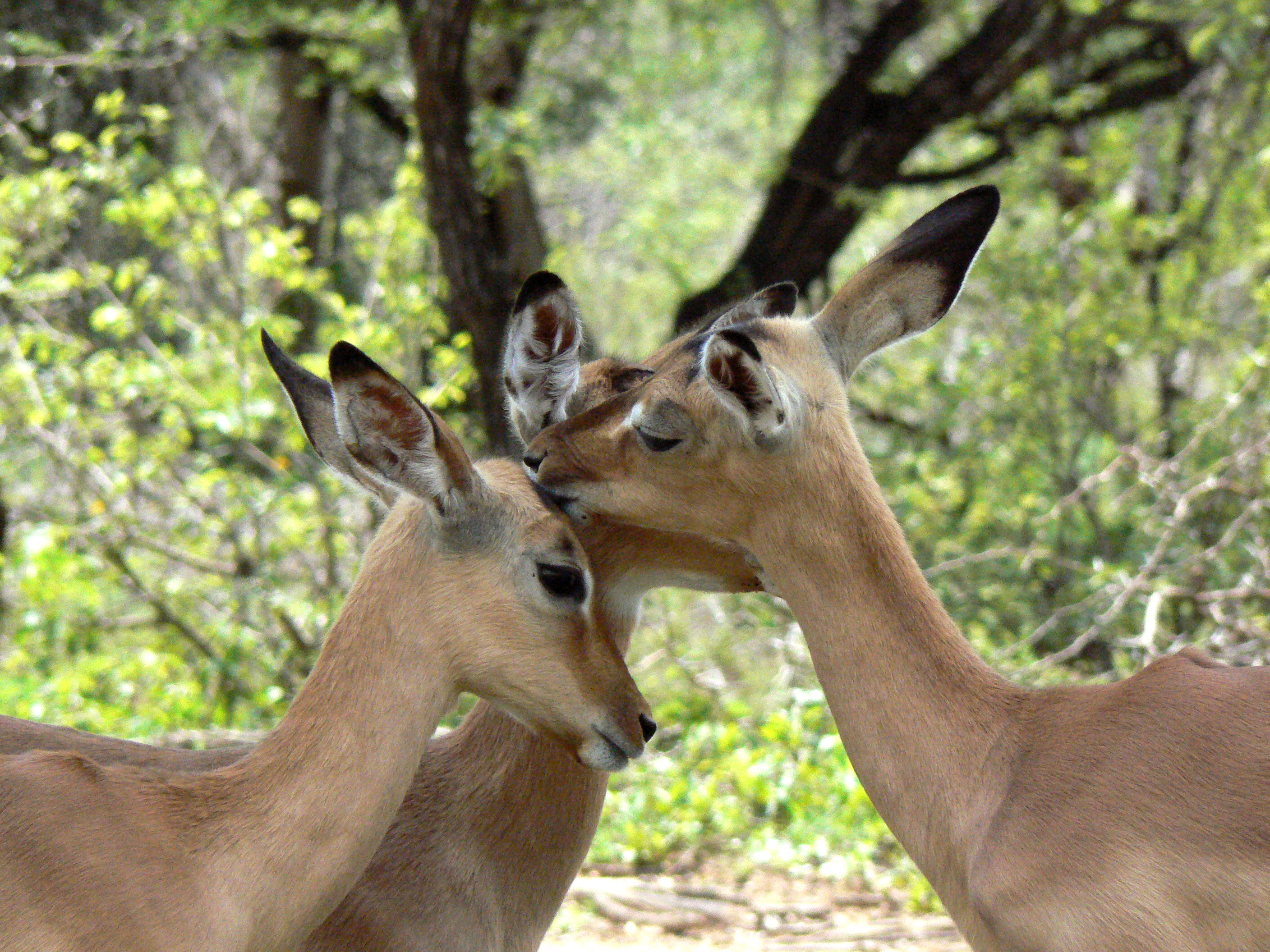 Awww